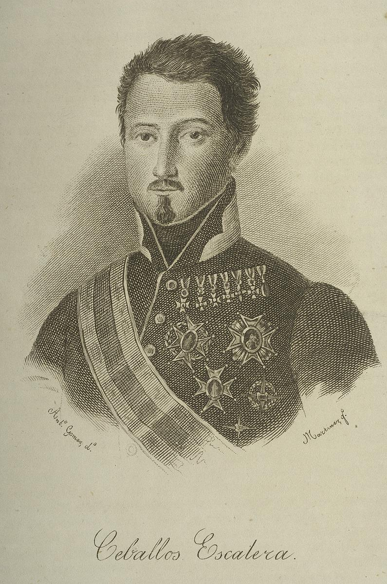 General del ejercito liberal Rafael Ceballos Escalera